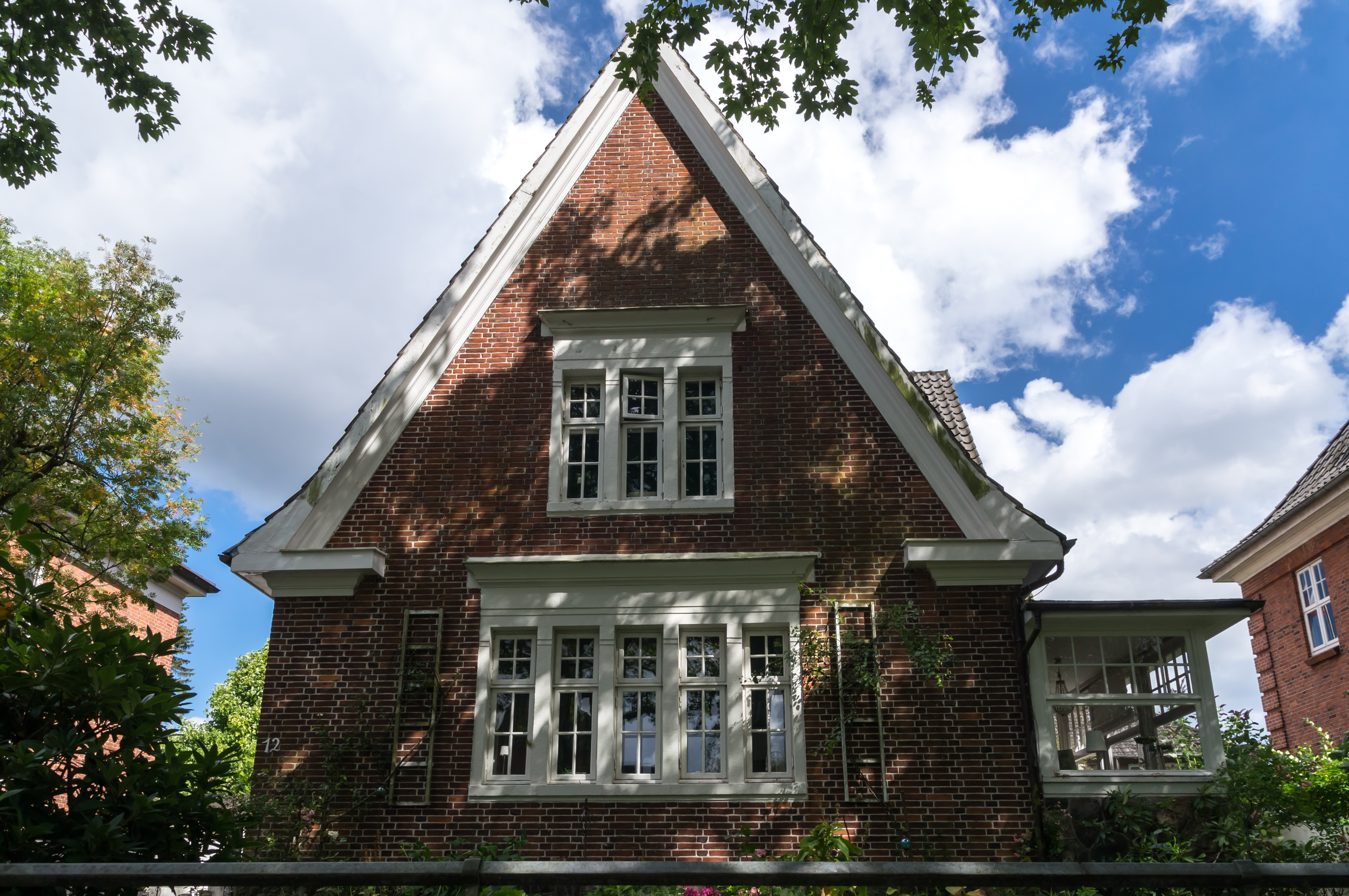 Flensburg-Westliche Höhe; Falkenberg 12; Villa; Denkmal-Nr. 4